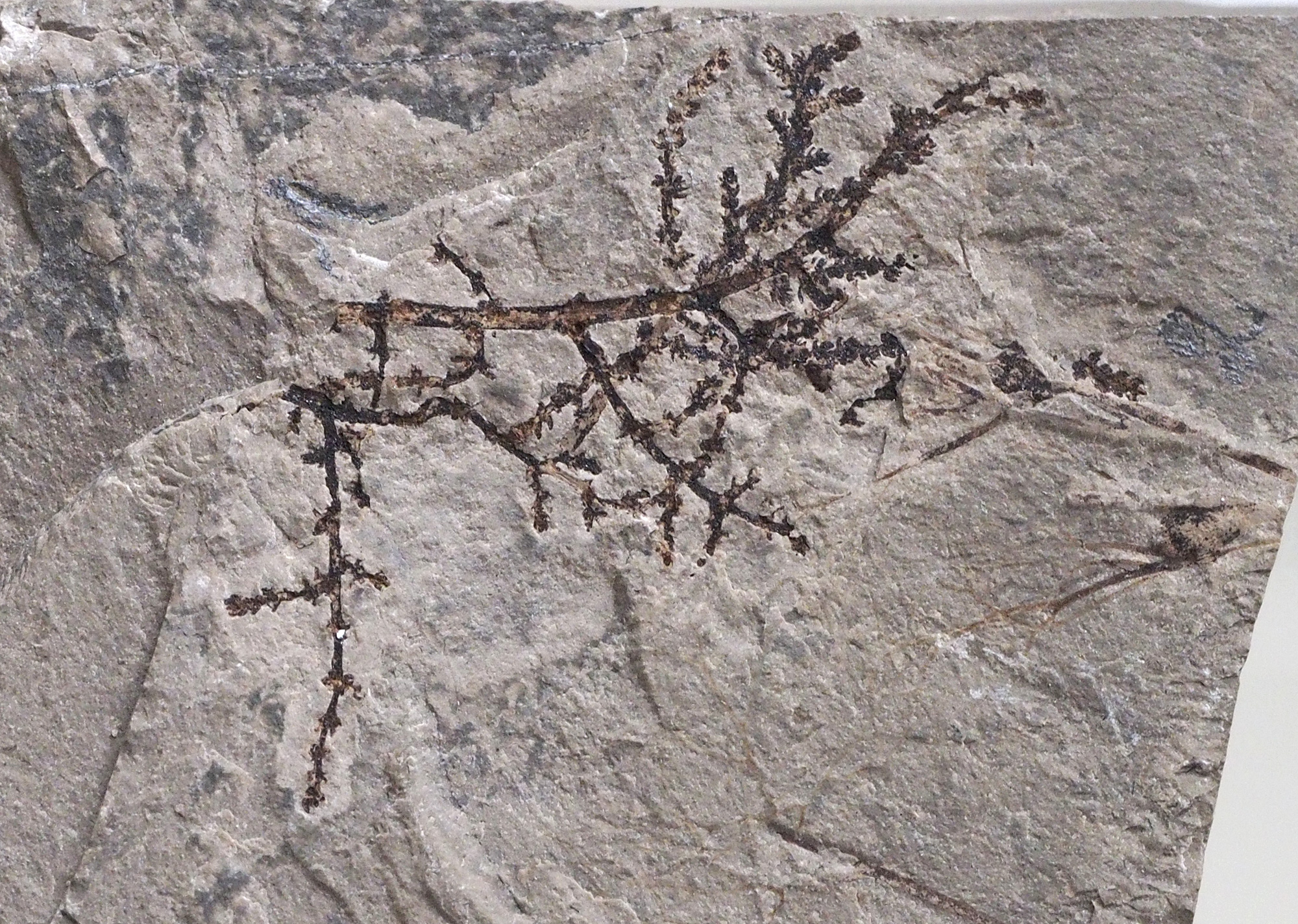 Montsechia vidalii (Zeiller) Teixeira. Cretácico Inferior de Rubies (Lérida). Museo Geominero (Madrid)